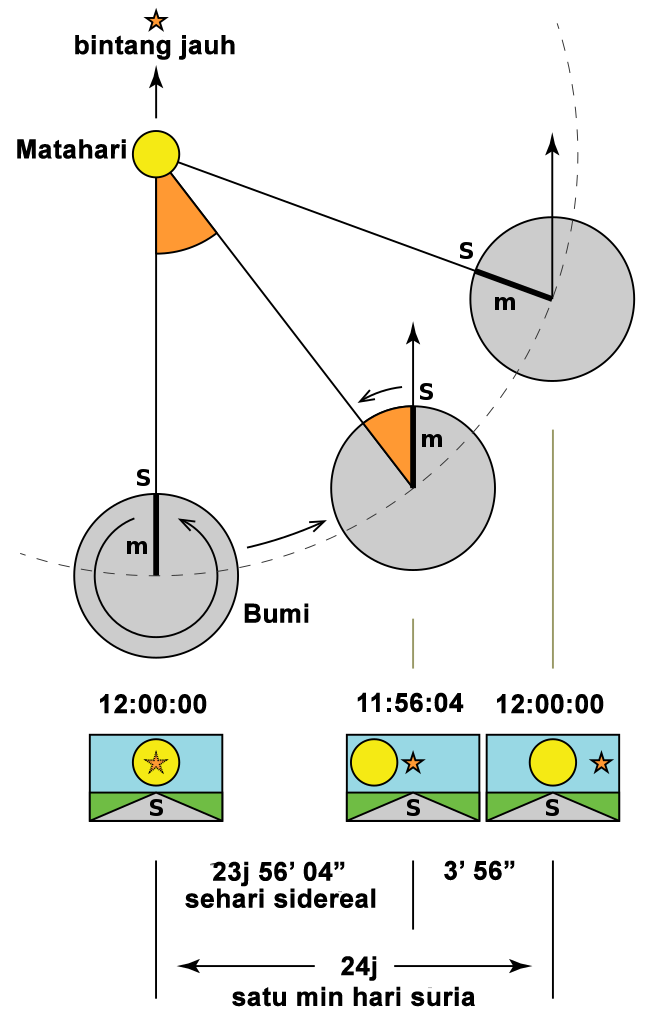 Perbandingan masa sidereal dan suria, berdasarkan File:Sidereal_Time_en.PNG.